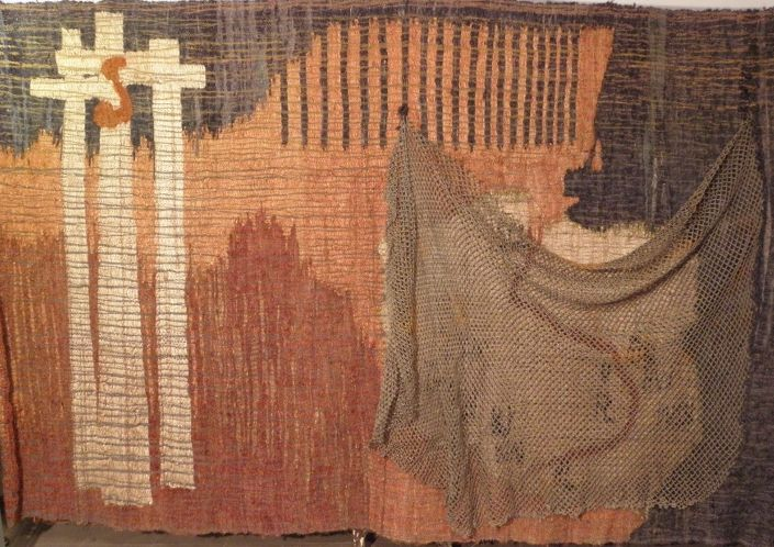 Tkanina Urszuli Kołaczkowskiej "Doktryna Breżniewa", 1982